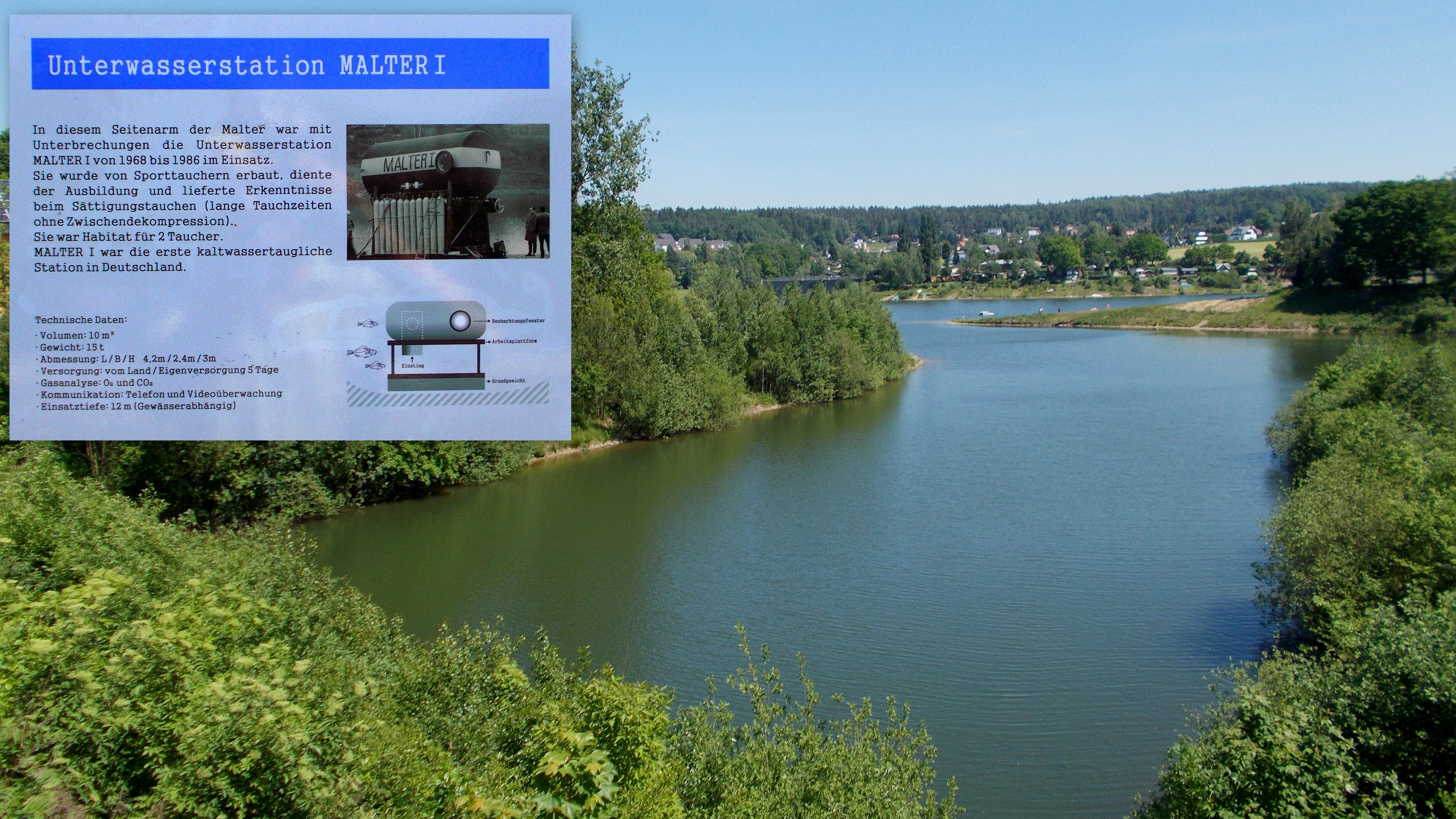 erste deutsche Unterwasserstation im Kaltwasser